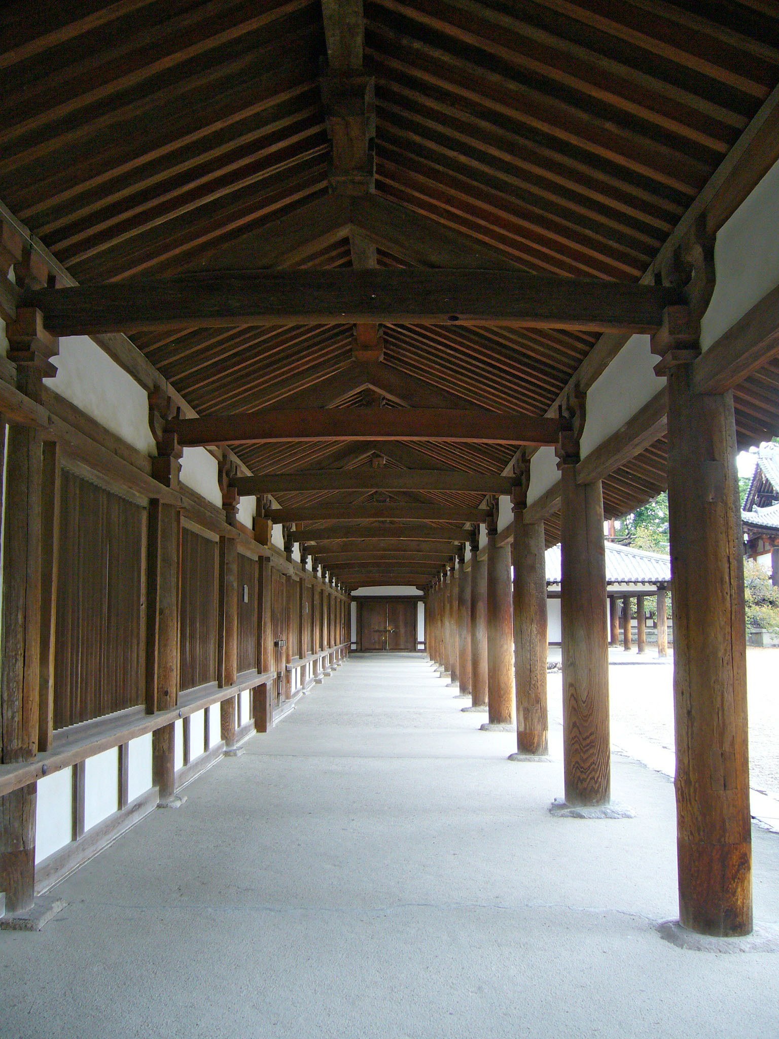 Horyu-ji in Ikaruga, Nara, Japan